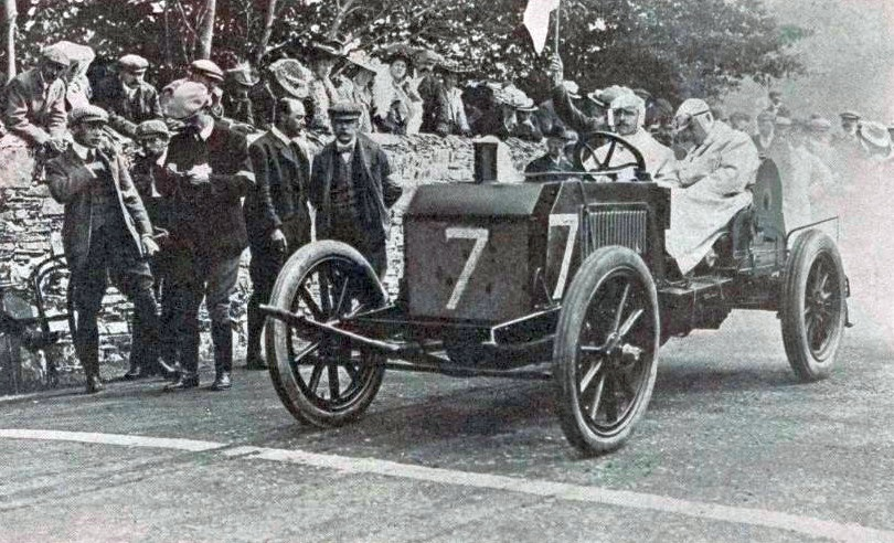 Clifford Earp, vainqueur des Éliminatoires anglaises de la Coupe Bennett 1905, sur Napier - La Vie au Grand Air du 9 juin 1905, p.467